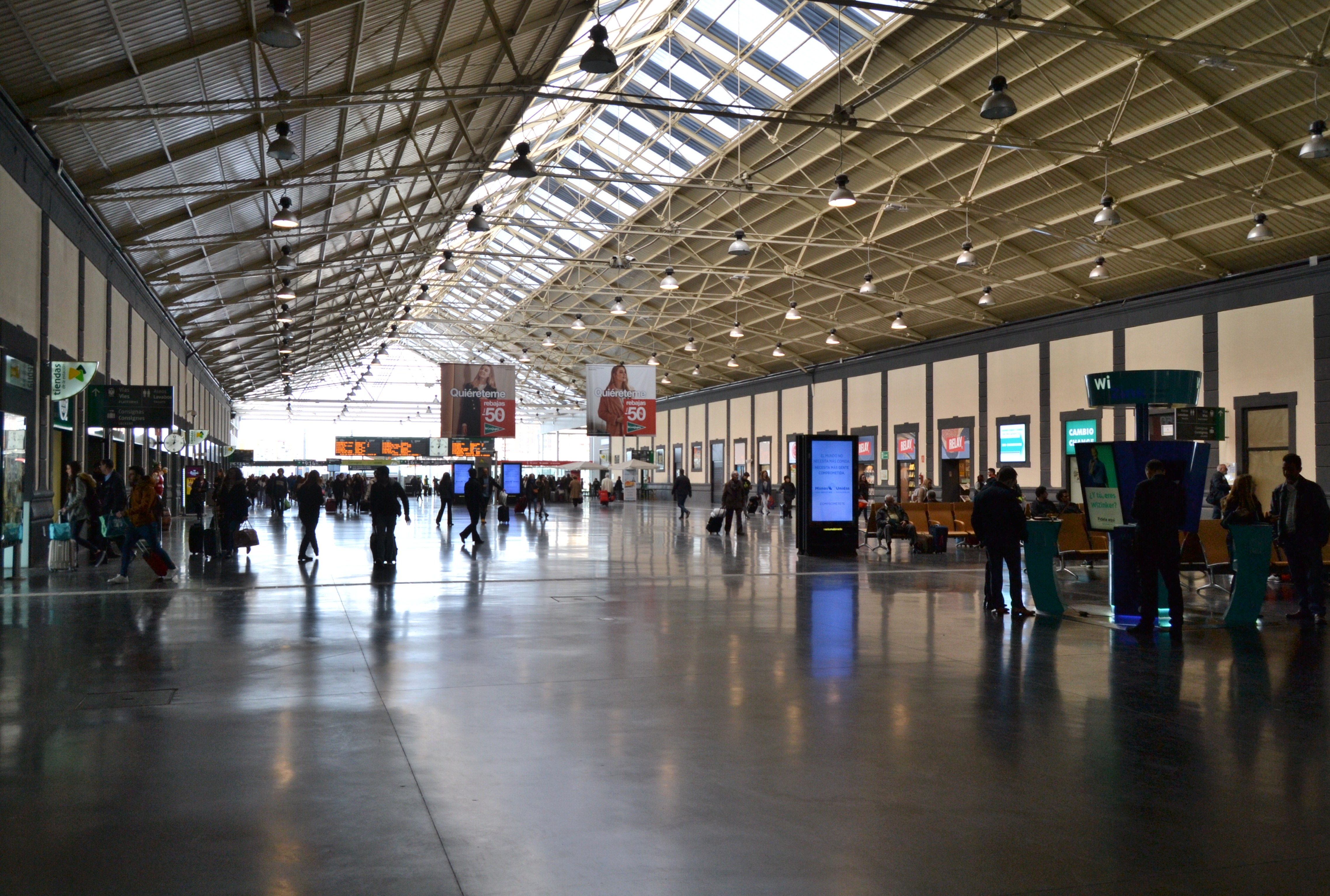 Alacant, interior de l'estació de tren.